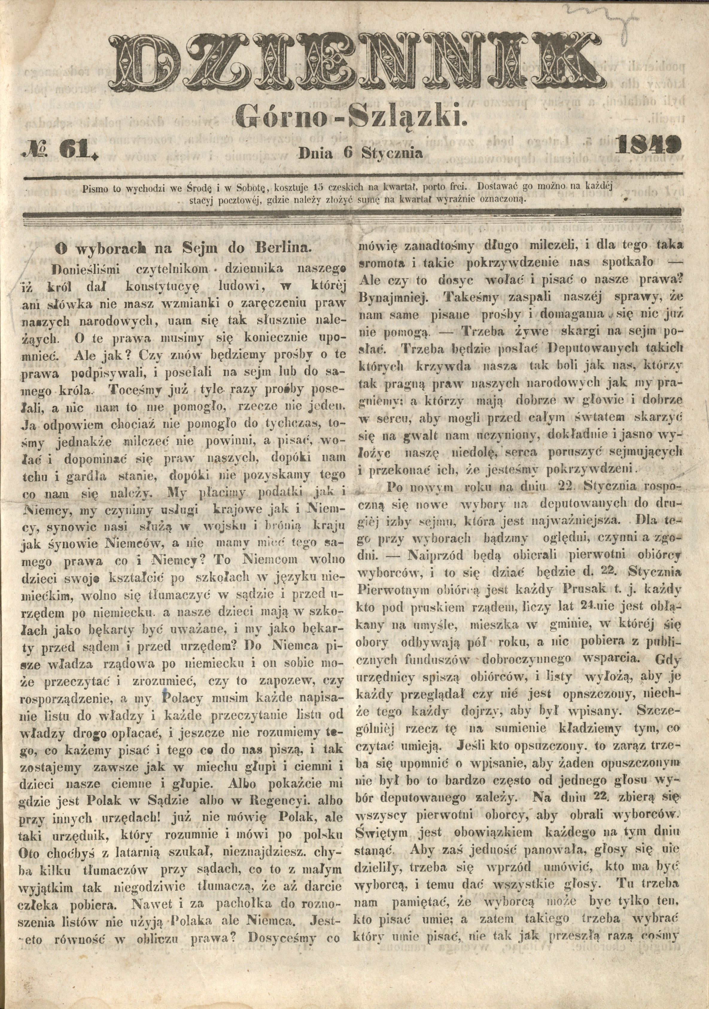 Karta tytułowa Dziennika Górnośląskiego z 6 stycznia 1849 r. drukowanego w Bytomiu.